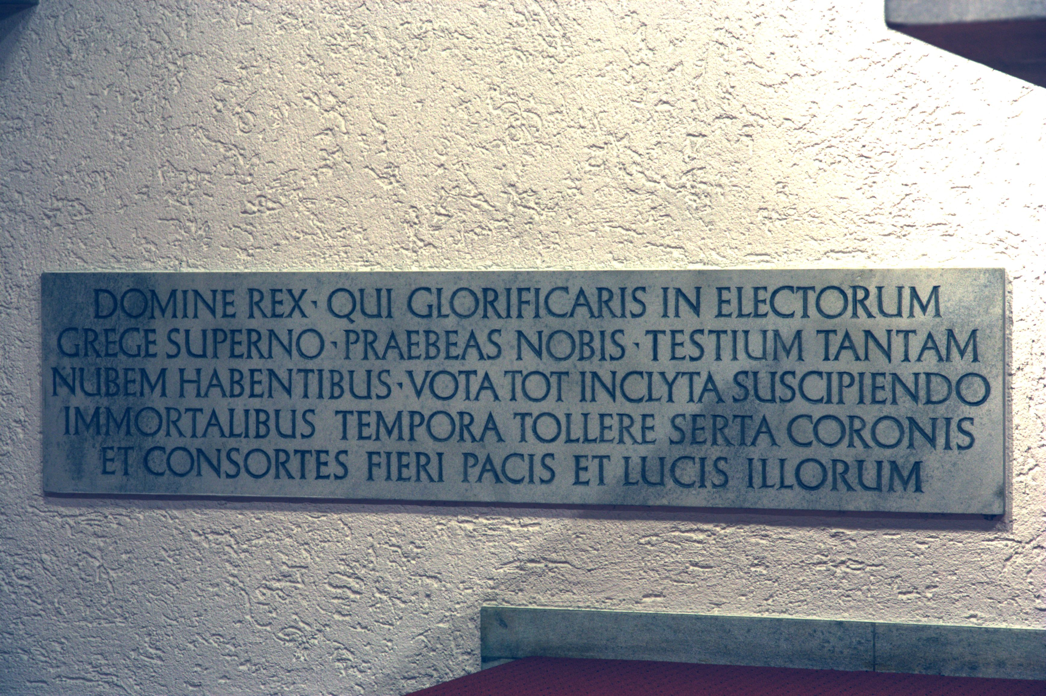 Römisch-katholische Pfarrkirche Allerheiligen Zürich-Neuaffoltern, Inschrift in der Krypta